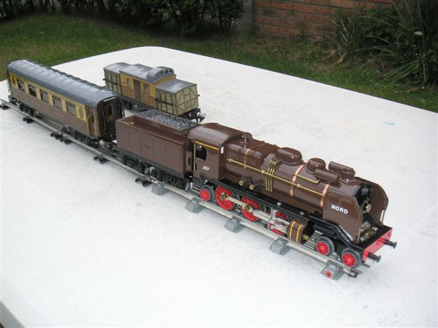 miniature du train la flèche d'or par JEP